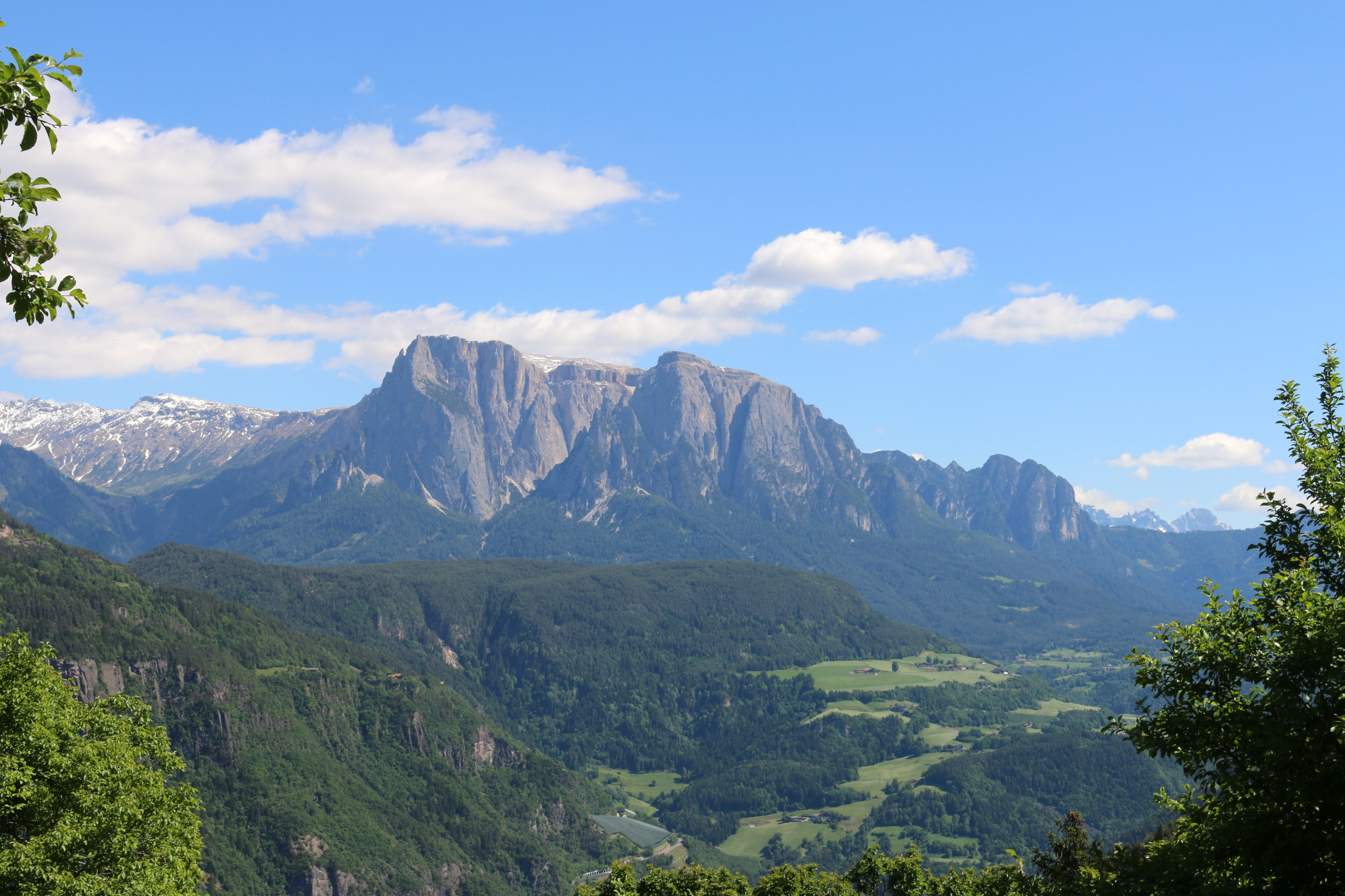 Barbian, Südtirol: Blick zum Santner und Schlern